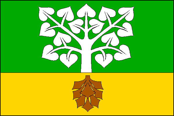 vlajka, Zborov, okres Šumperk